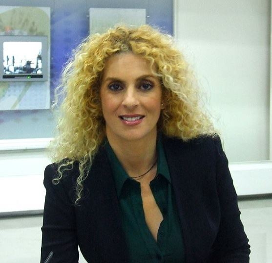 מותר לשימוש בתיאום עם ניו מדיה רשות השידור